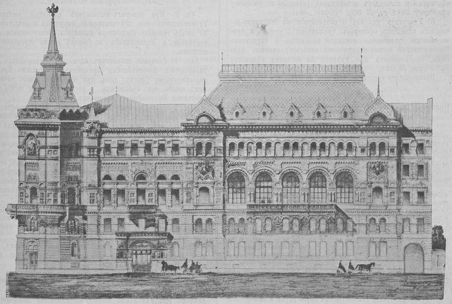 Здание собрания офицеров Гвардейского корпуса, вид с Литейного проспекта.